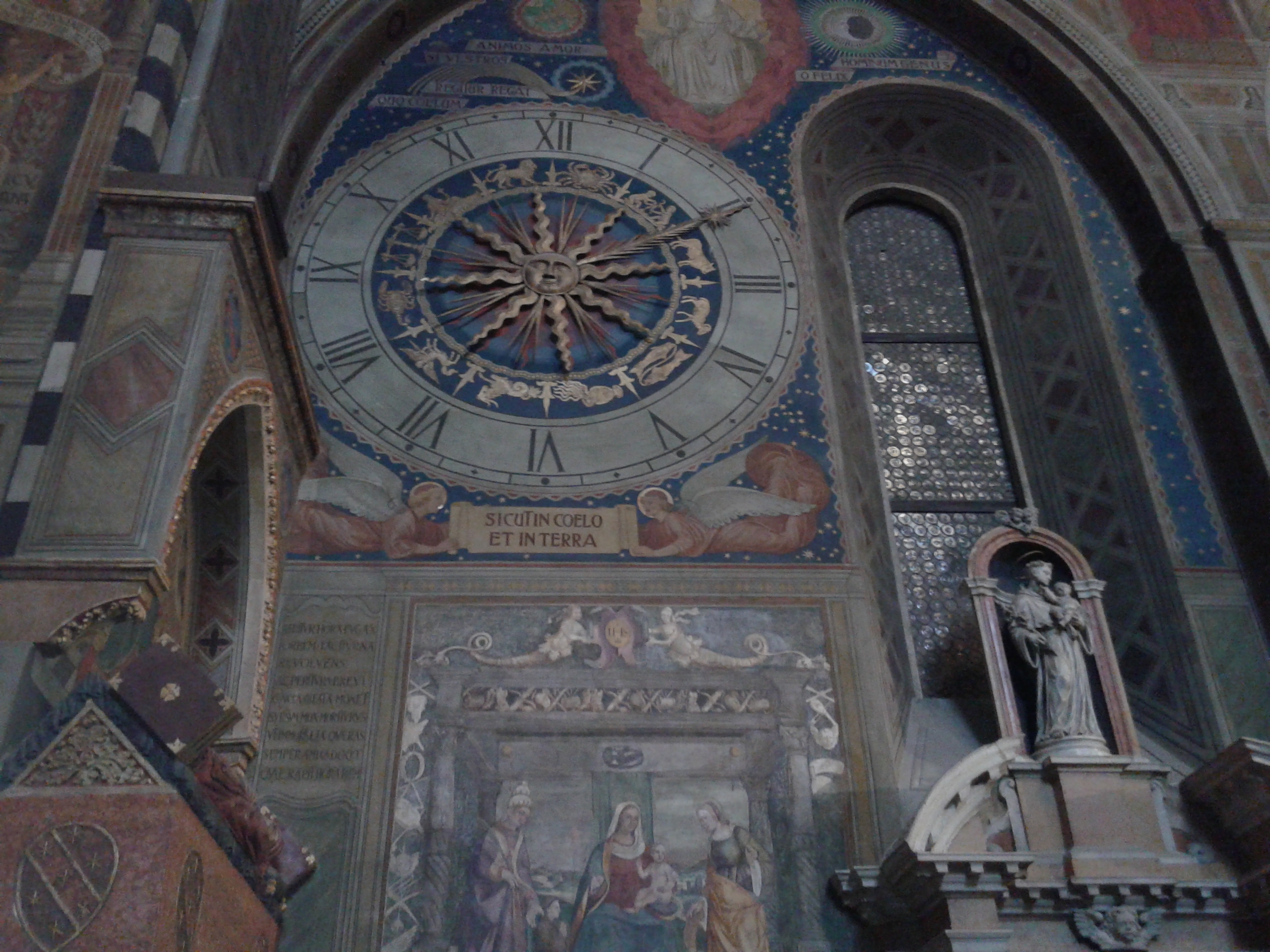 Orologio del 1759 situato nella navata destra della Basilica del Santo all'altezza dell'altare maggiore.